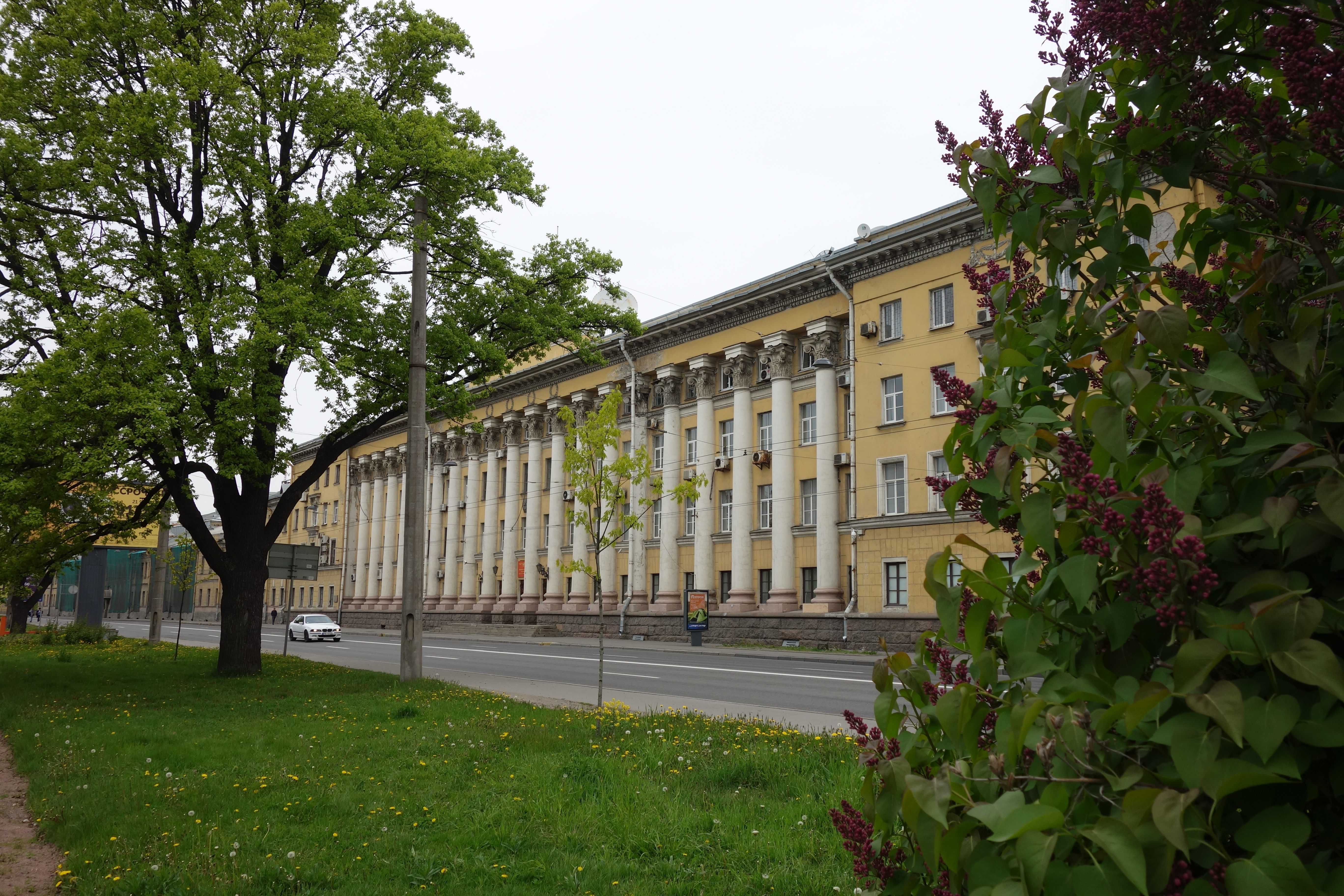 Georgij Ivanov. Kadettenkorps in St. Petersburg